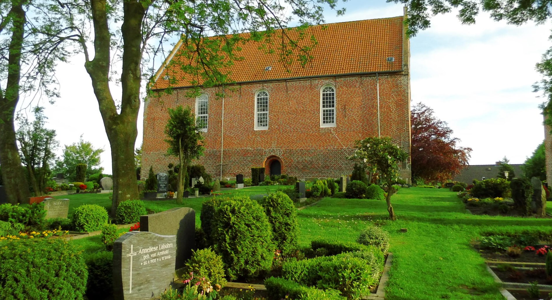 Evangelisch-lutherische St. Martinus-Kirche Etzel (Nordseite) Ortschaft Etzel, Gemeinde Friedeburg, Landkreis Wittmund, Niedersachsen, Deutschland